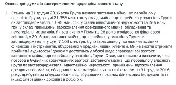 Основа для думки із застереженнями щодо фінансового стану